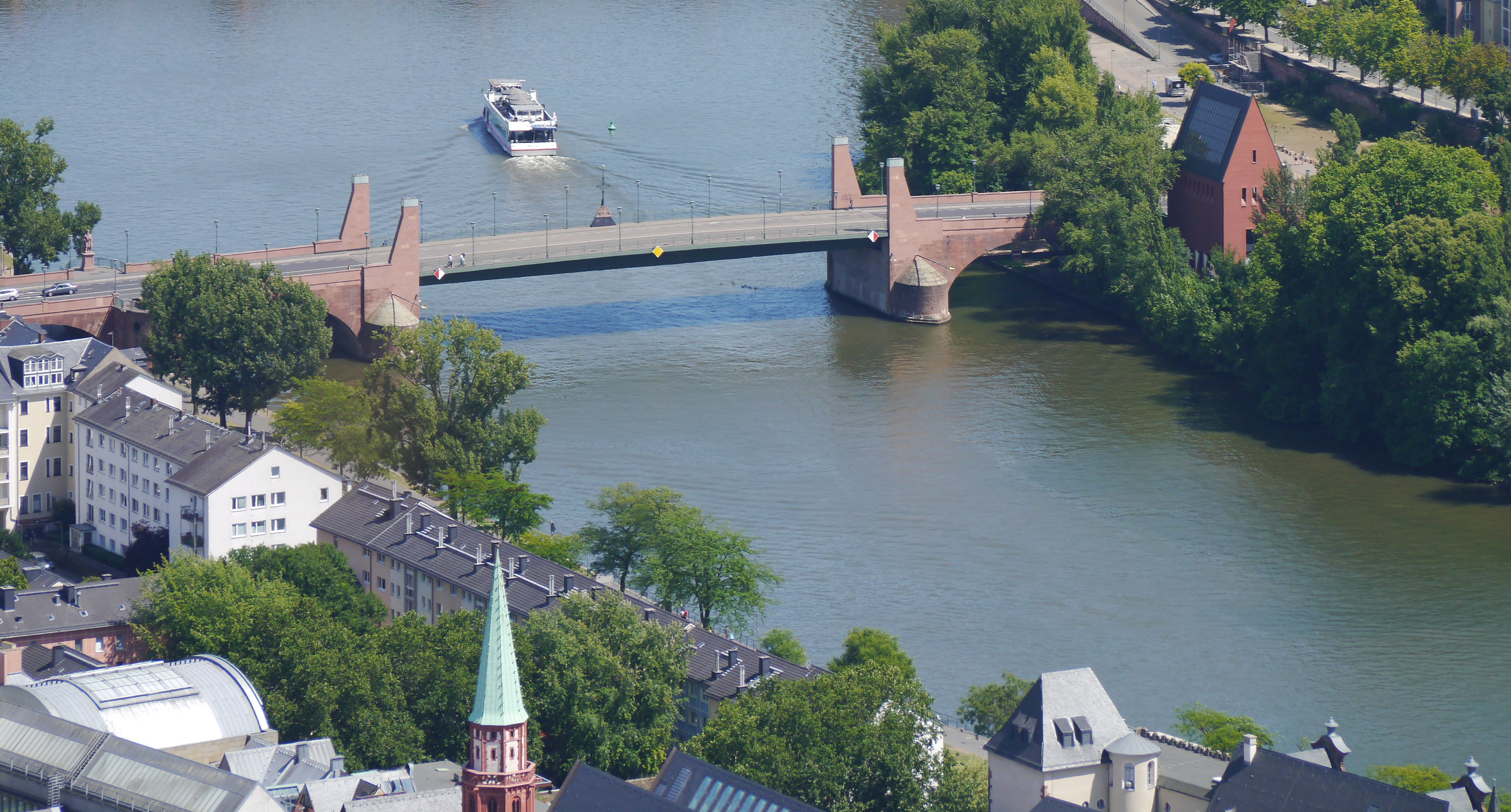 Alte Brücke in Frankfurt am Main, 2018 vom Maintower aus.